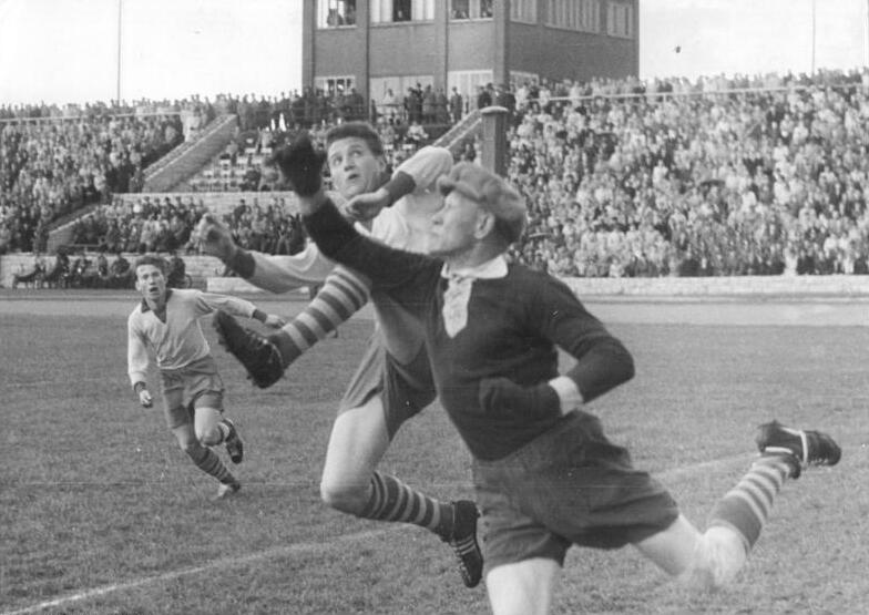 Zentralbild-Bey.-Wen. Bey.-ot 5.5.1957 Turbine Erfurt besiegte Vorwärts 2:0 - Am Sonntag, dem 5.5.1957, standen sich im Berliner Jahnsportpark in einem Fußball-Oberligaspiel der ASK Vorwärts Berlin und Turbine Erfurt gegenüber. Die Gäste aus Thüringen siegten mit 2:0. UBz: Der Erfurter Torwart Jahn (rechts) lenkt einen Flankenball vor dem Berliner Stürmer Meyer über die Latte. (Links: Kaulmann (Vorwärts).